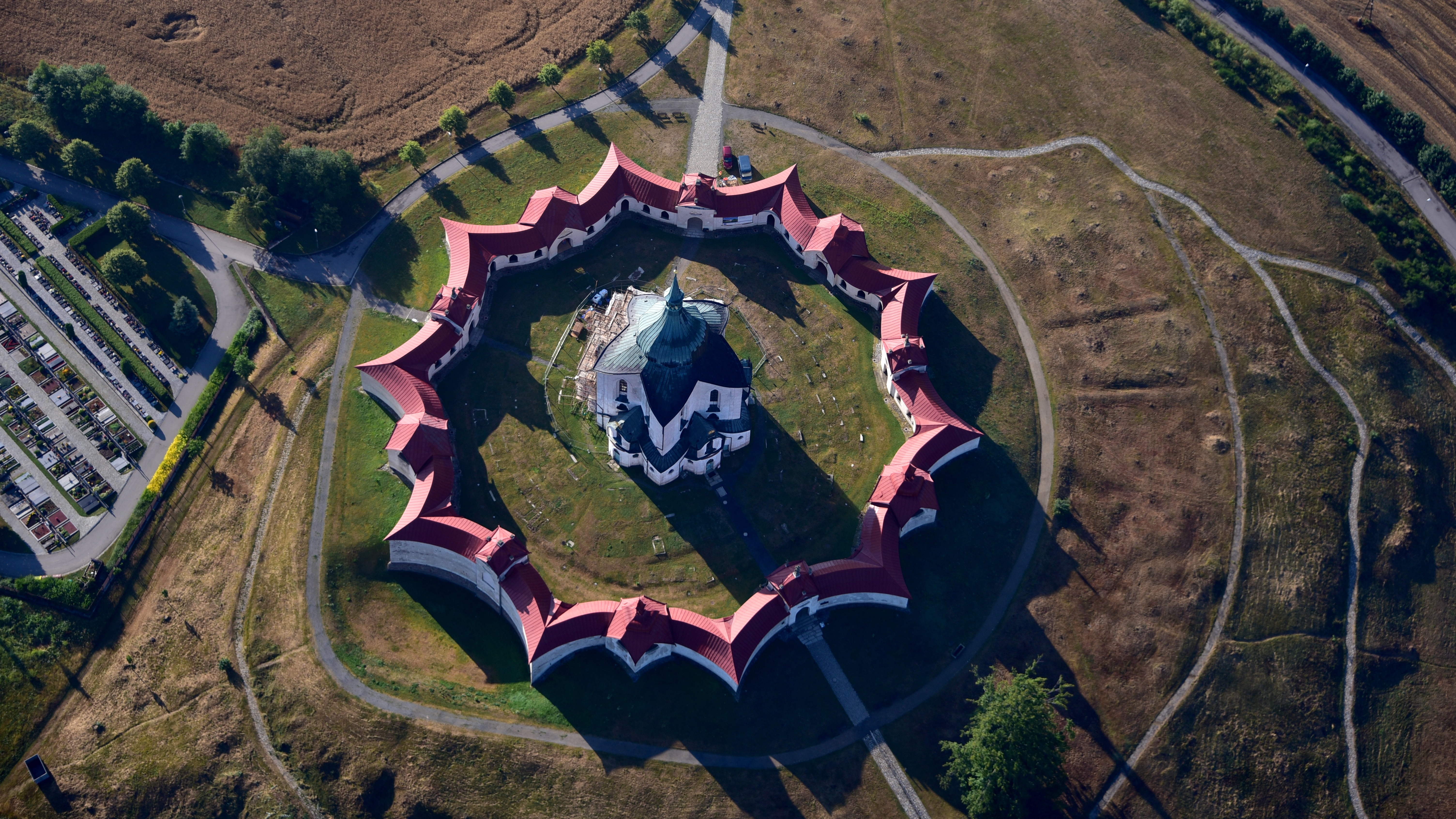 CZ - Žďár nad Sázavou, Wallfahrtskirche Zelená Hora, Luftaufnahme (2018)